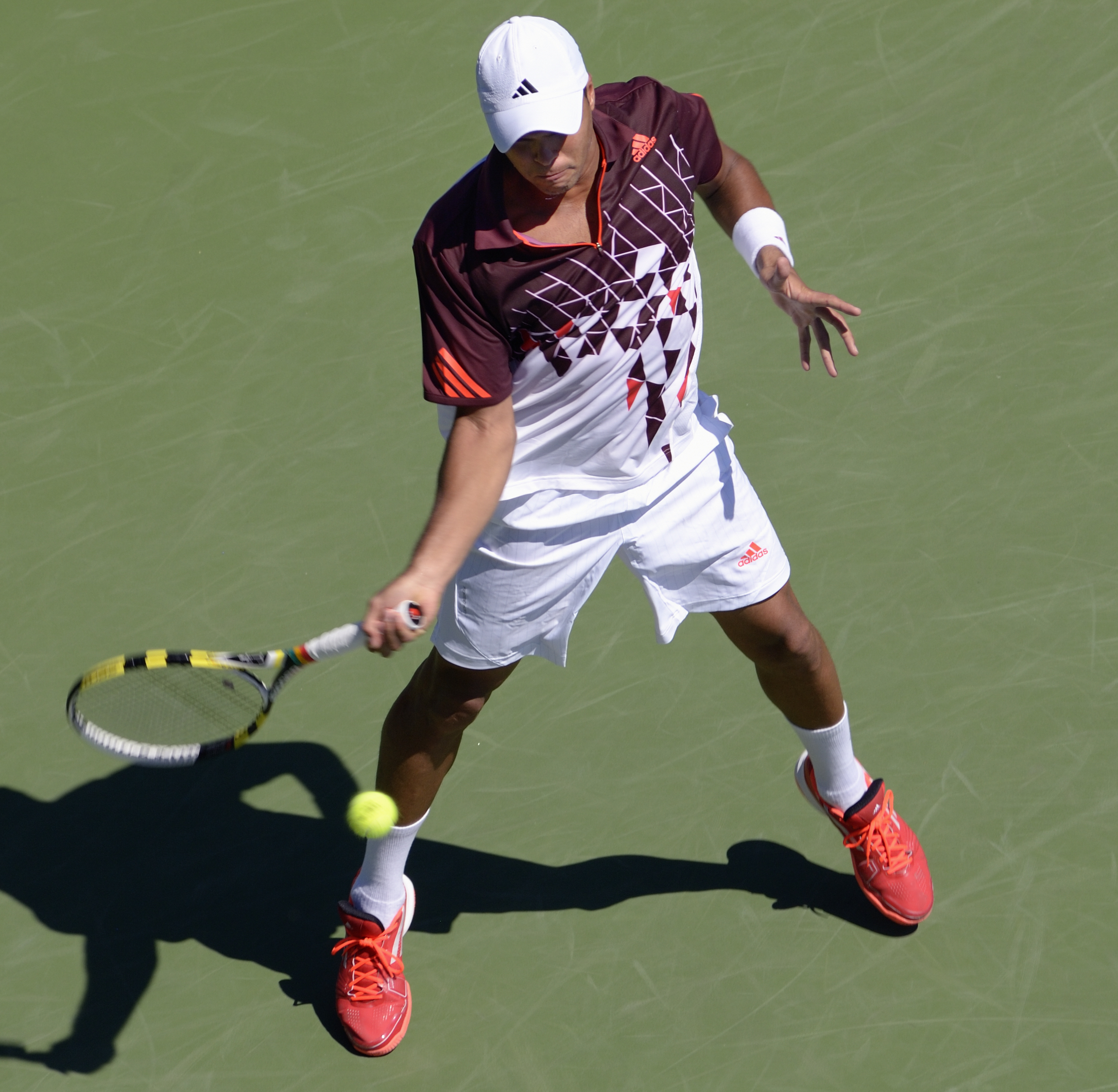 jo forehand